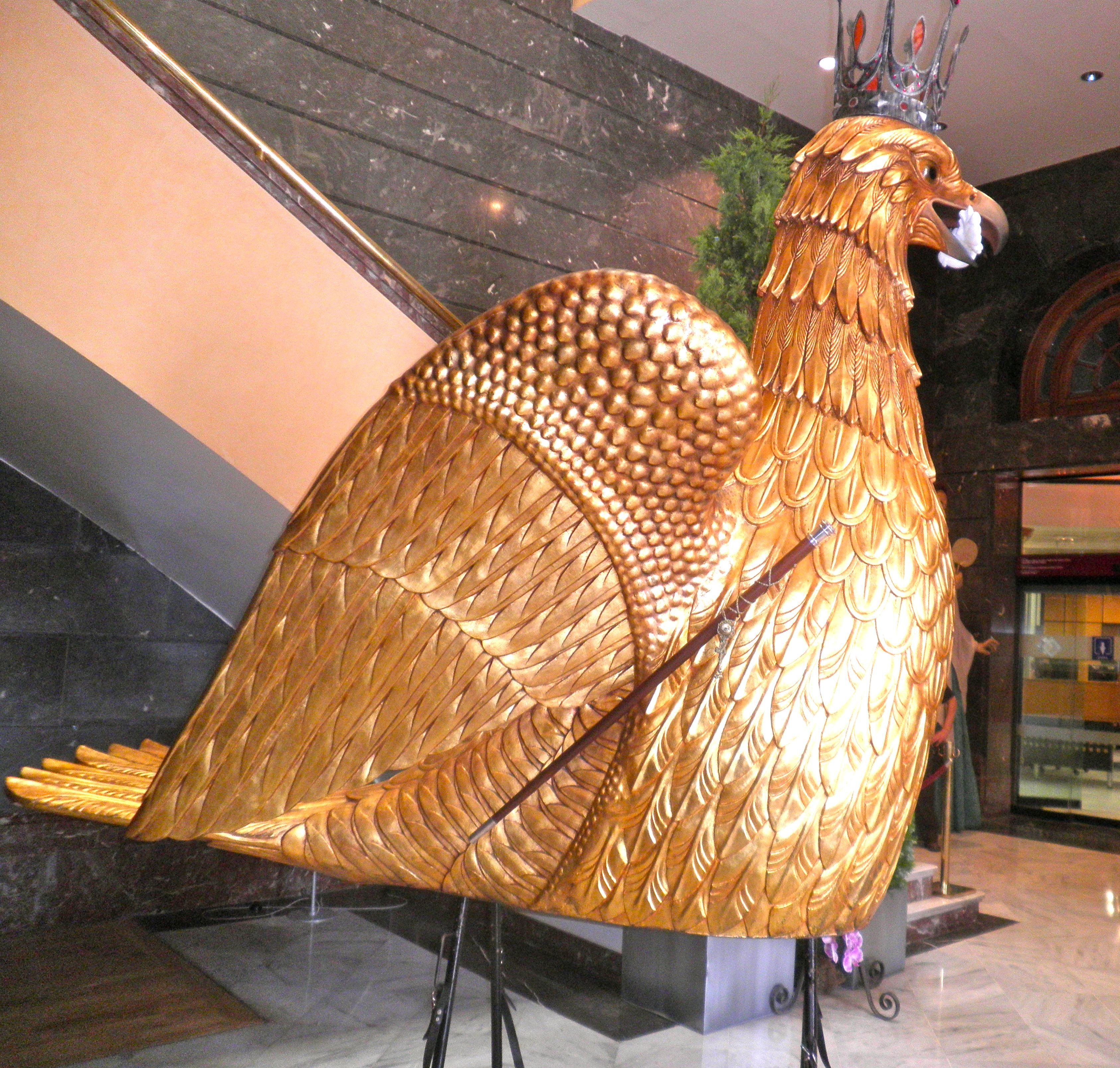 L'Àliga de Reus al vestíbul de l'Ajuntament de la ciutat